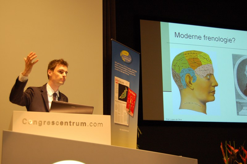 Foto gemaakt van Jeroen Geurts bij de NIBI conferentie 2011